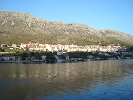 Nova Mokošica